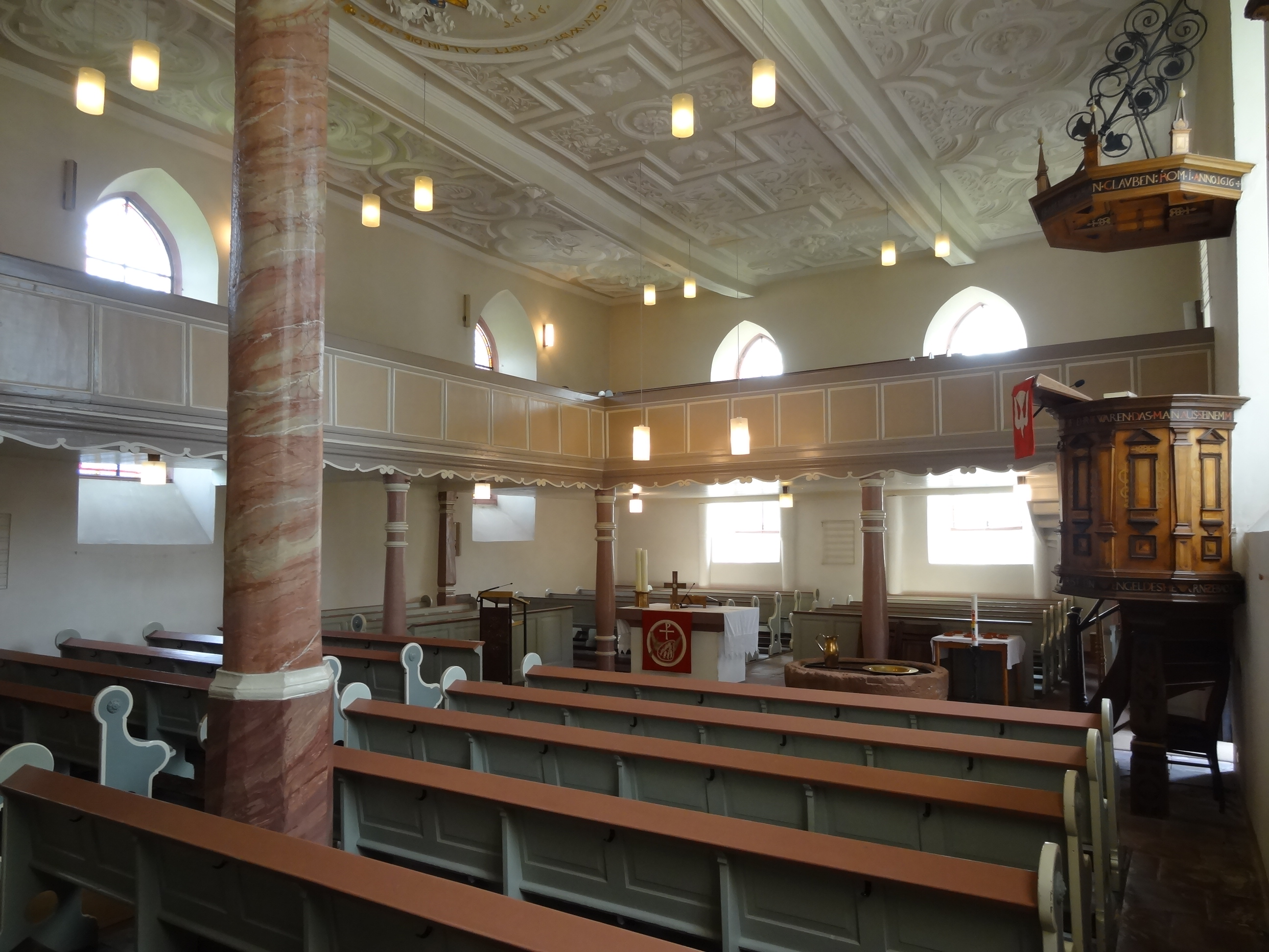 Evangelische Pfarrkirche (Nieder-Weisel)